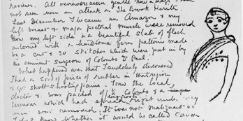 Florence Farr's last letter to W.B. Yeats